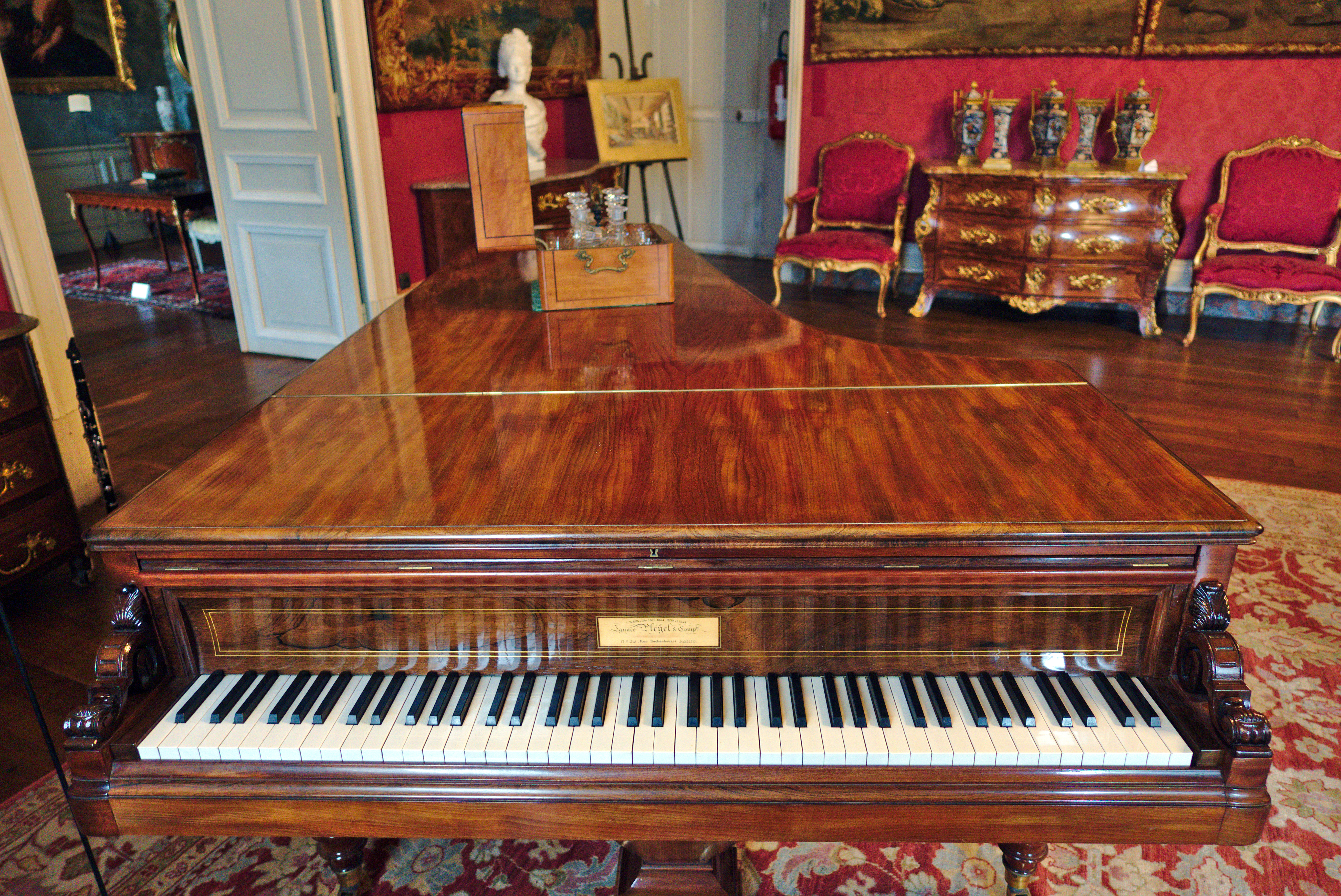 Son piano de concert (château d'Aulteribe) est l'œuvre d'Ignace Pleyel & Cie facteur à Paris vers 1845. Il est en bois d'acajou et palissandre avec un châssis en hêtre, érable et épicéa. Le clavier en tilleul plaqué d'ivoire avec des feintes d'ébène.